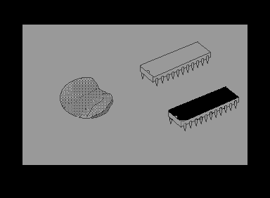 Chips, Ein Bild zu Silvester - Eine C64 Hires-Grafik die ich damals mit GEOS 64 (GeoPaint) pixelte